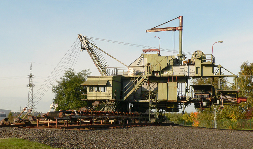 Braunkohlemuseum Borken